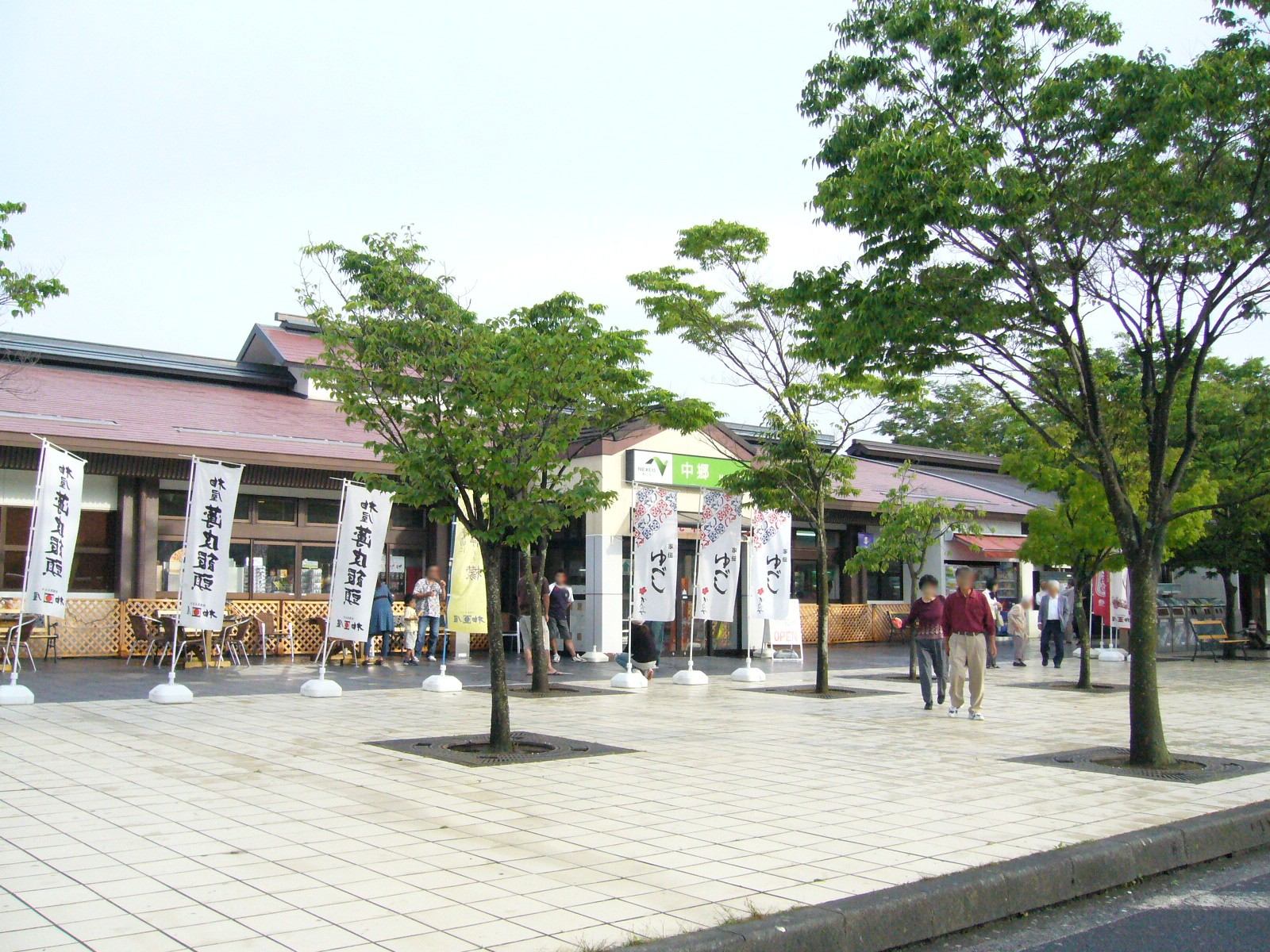 nakagou-SA-jyoban-expressway,kitaibariki-city,japan.JPG